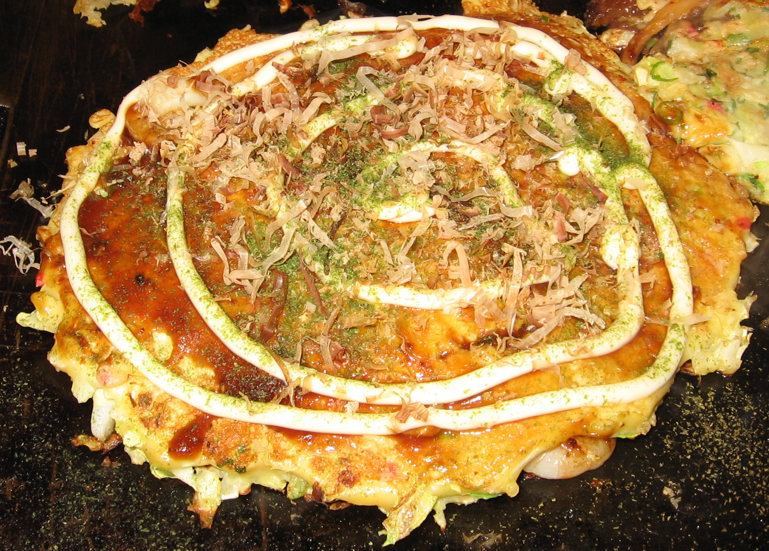 お好み焼き.